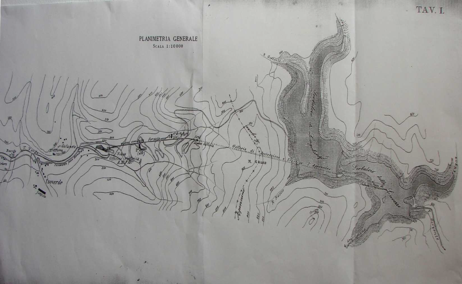 Planimetria Generale dei laghi Lavezze e Lagolungo della Società Anonima dell'acquedotto De Ferrari Galliera. Sono rappresentati inoltre la galleria transappenninica, il sito delle tre centrali idroelettriche a quote diverse, la nuova più potente che le ha sostituite e ad Isoverde la sede dello Iutificio